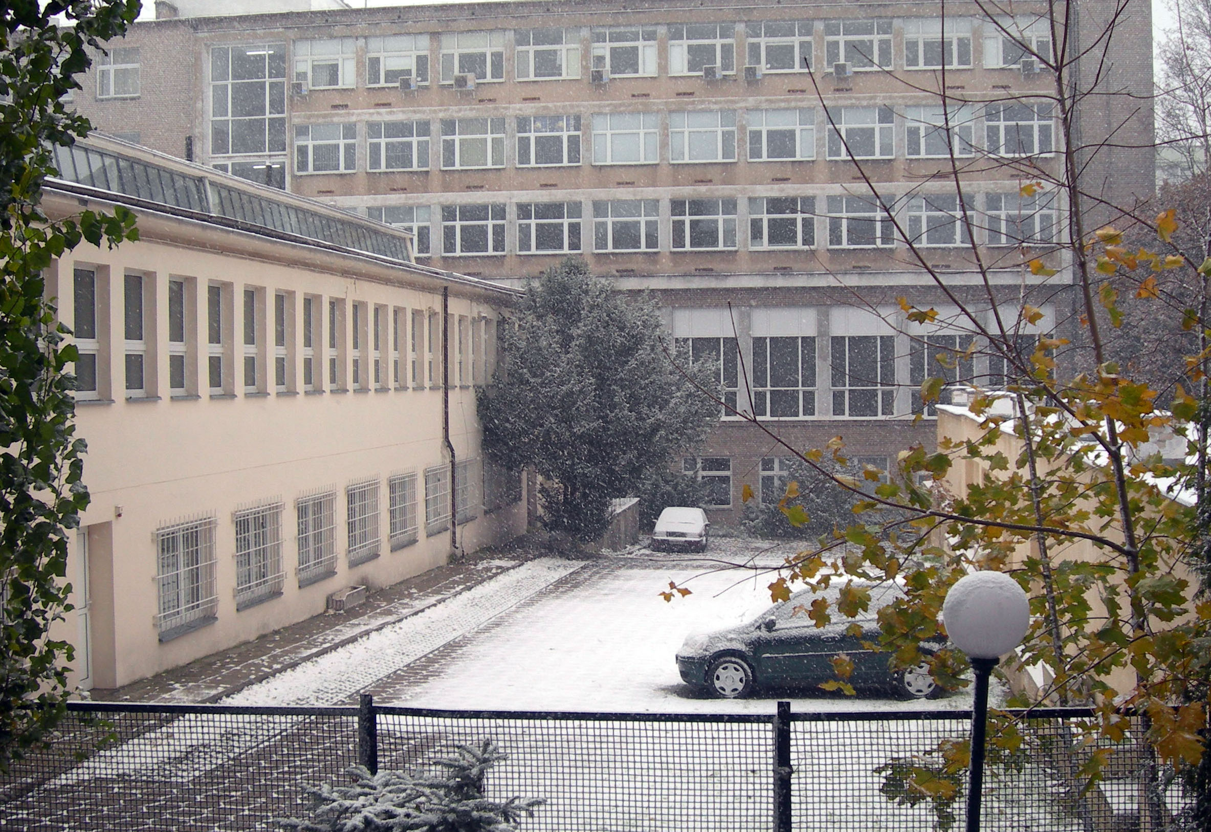 Instytut Wzornictwa Przemysłowego, ul. Świętojerska 3/5, Warszawa; widok z okna kamienicy przy ulicy Długiej